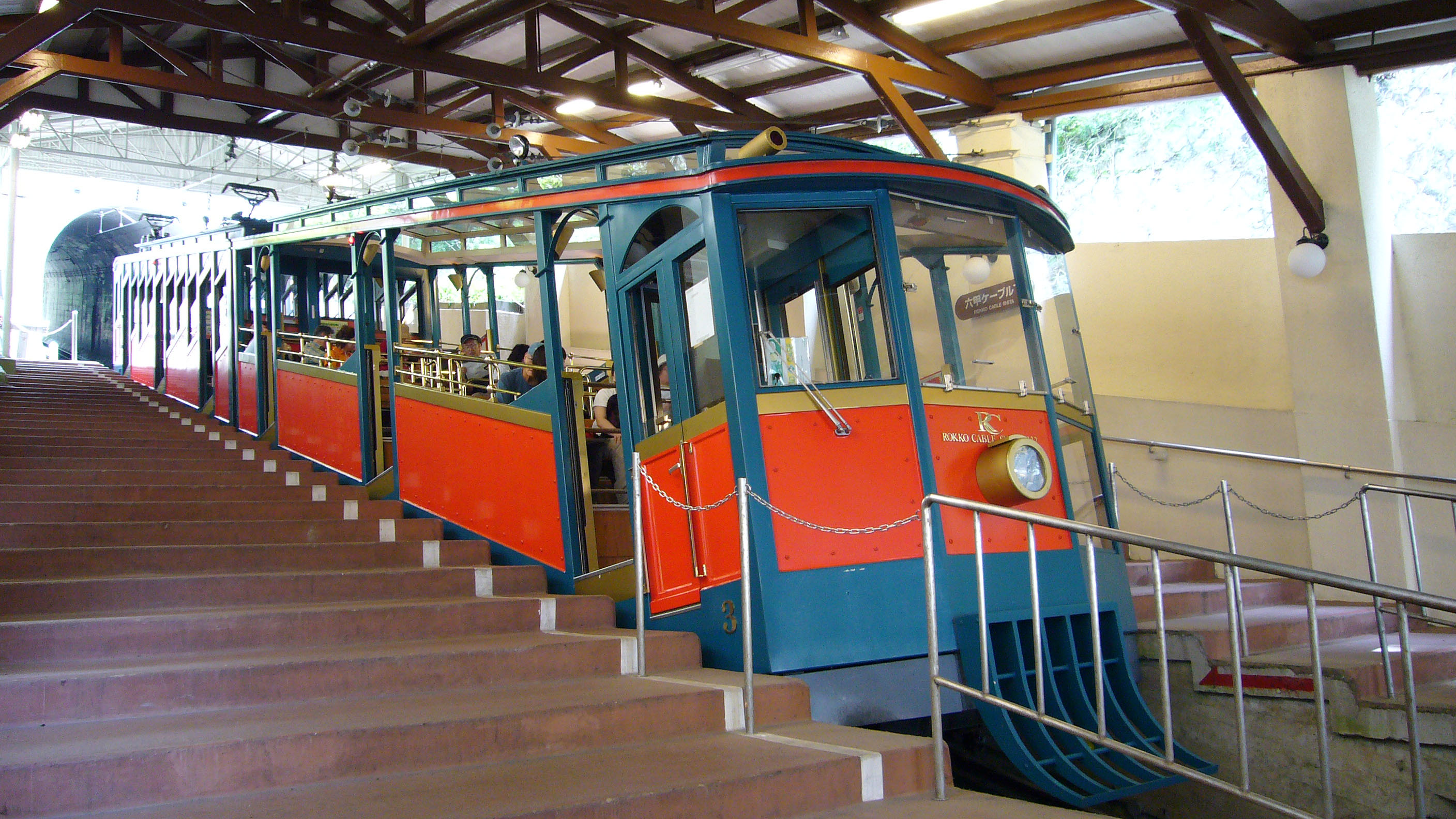 Rokko Cablecar in Kobe, Japan